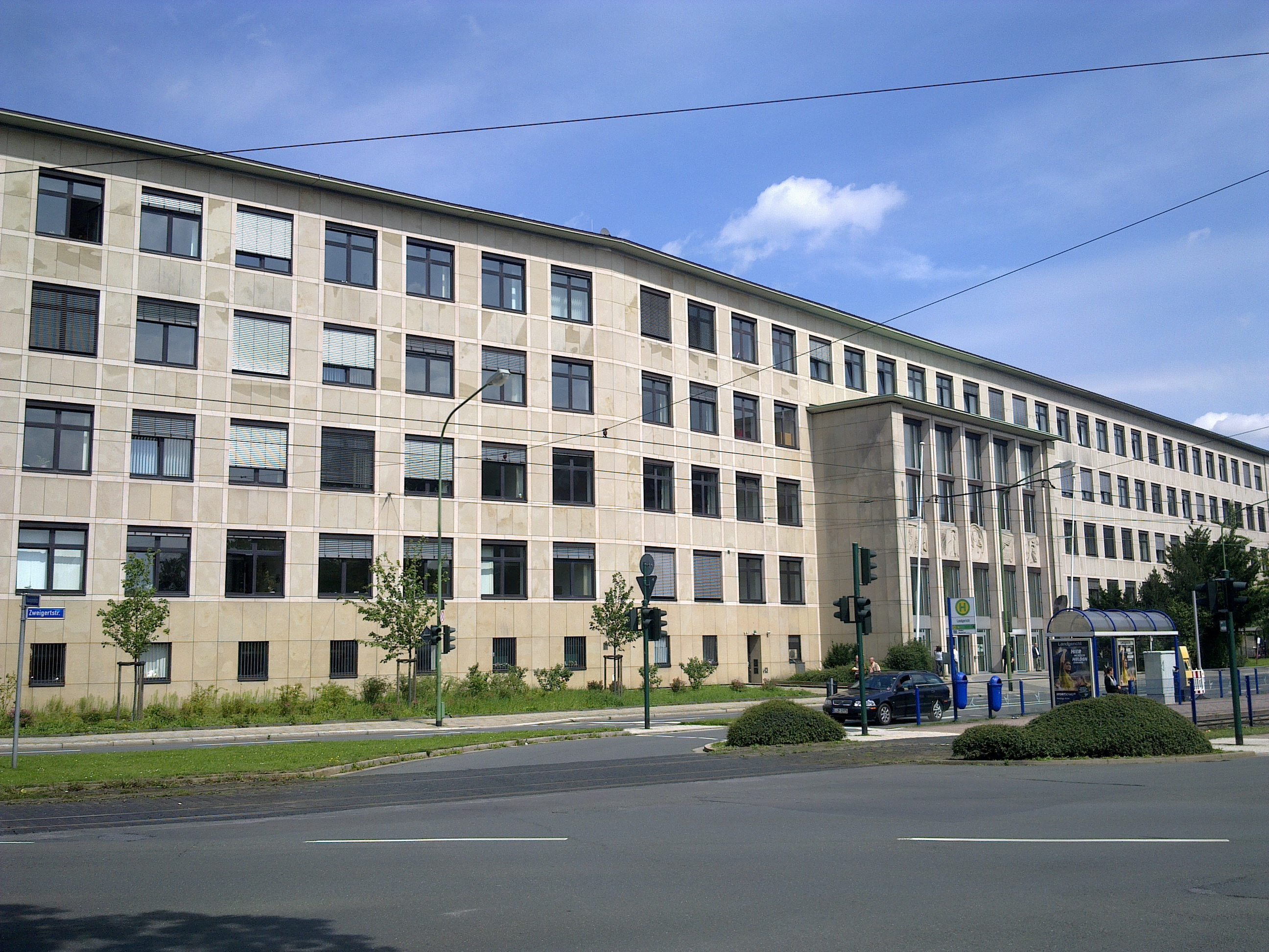 Amts- und Landgerichtsgebäude in Essen, Zweigerstraße 52